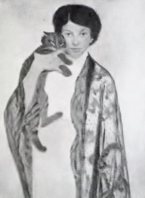 Önarckép macskával.